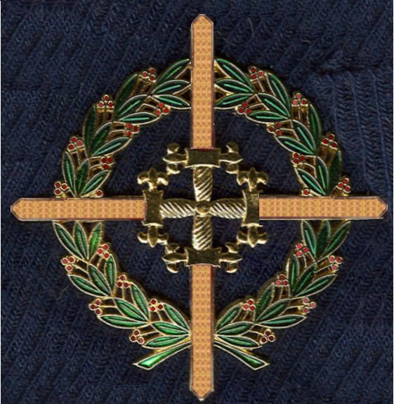 Modern kruis uit mijn verzameling, iets bijgewerkt